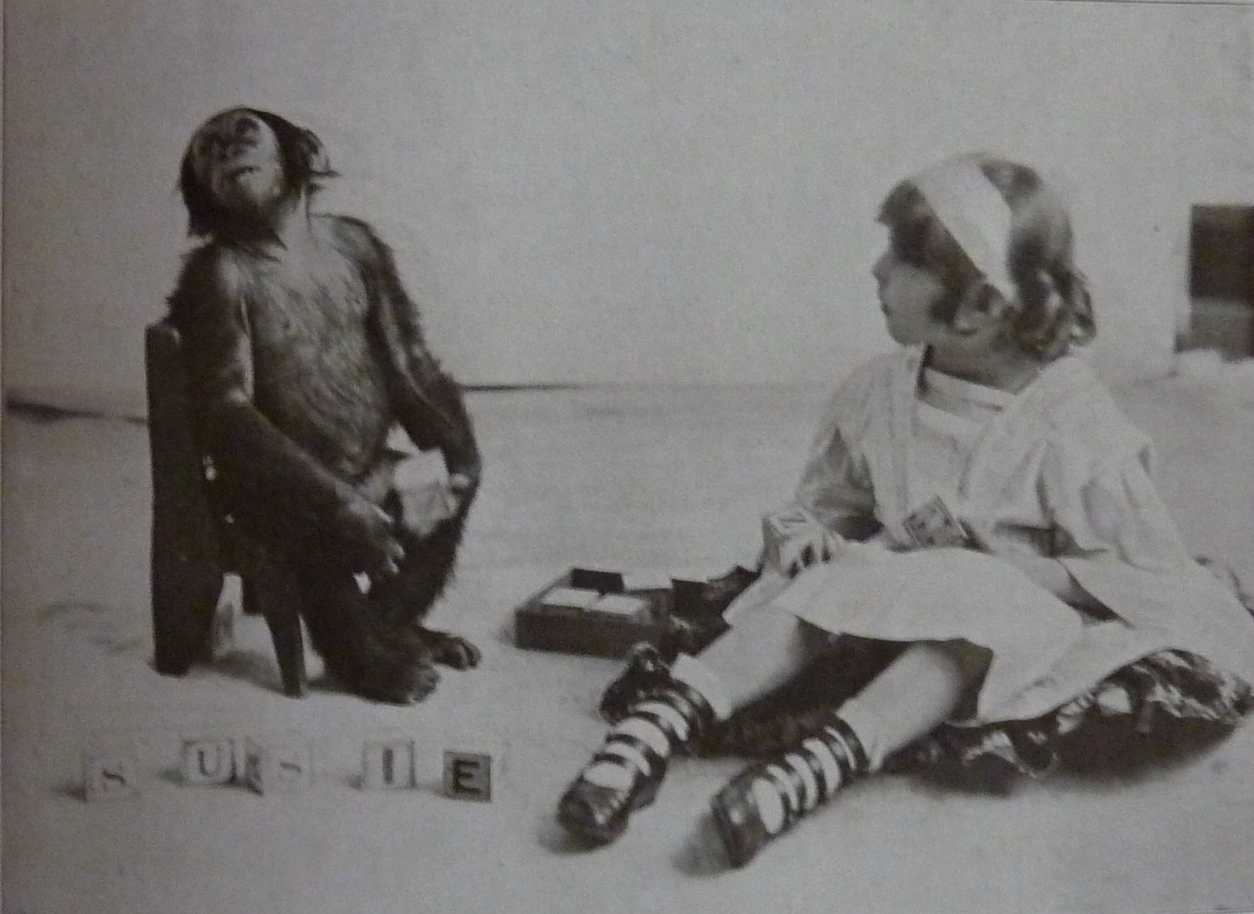 Susie, ein Schimpansenmädchen, mit dem R. L. Garner experimentierte